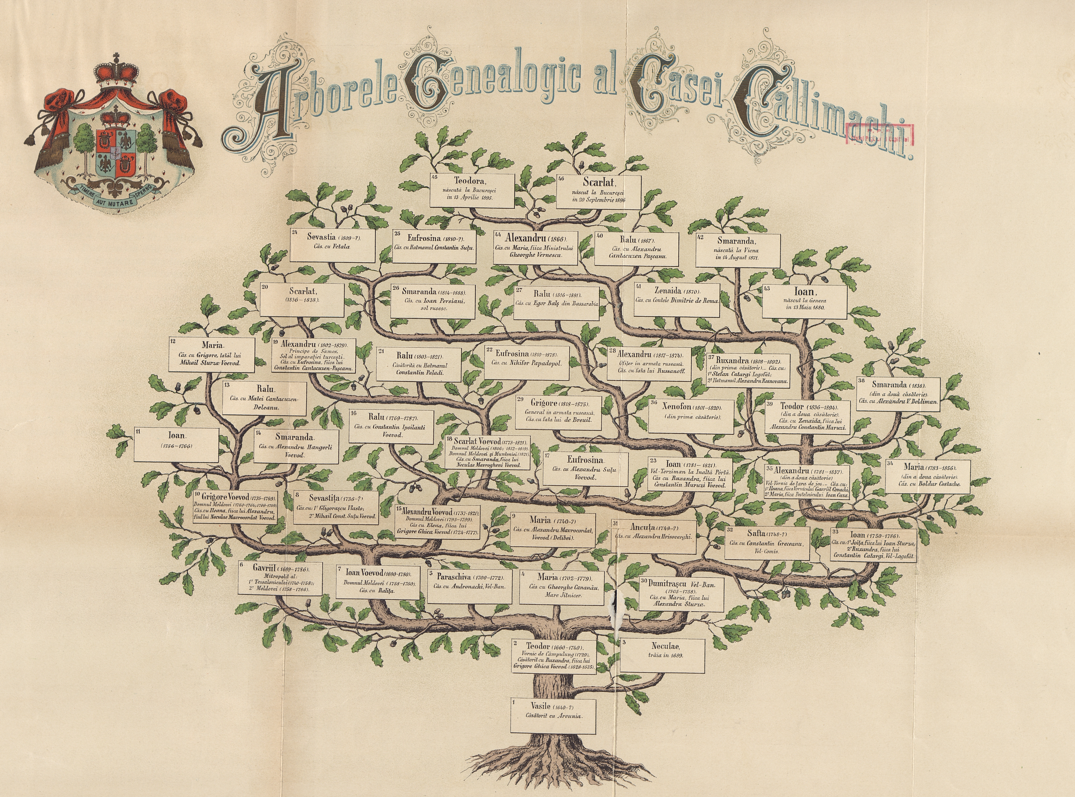 Gravură color, înafara textului, extras din: Istoria şi genealogia Casei Callimachi, Alexandru Dimitrie Xenopol. Bucureşti : Tipografia Curţii Regale, F. Göbl Fii, 1897, p.155-156